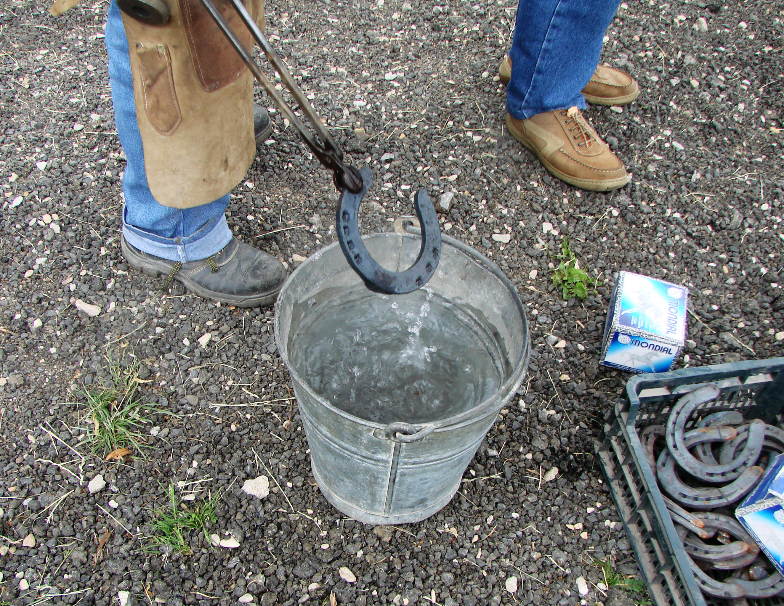 Le fer est refroidi dans l'eau.